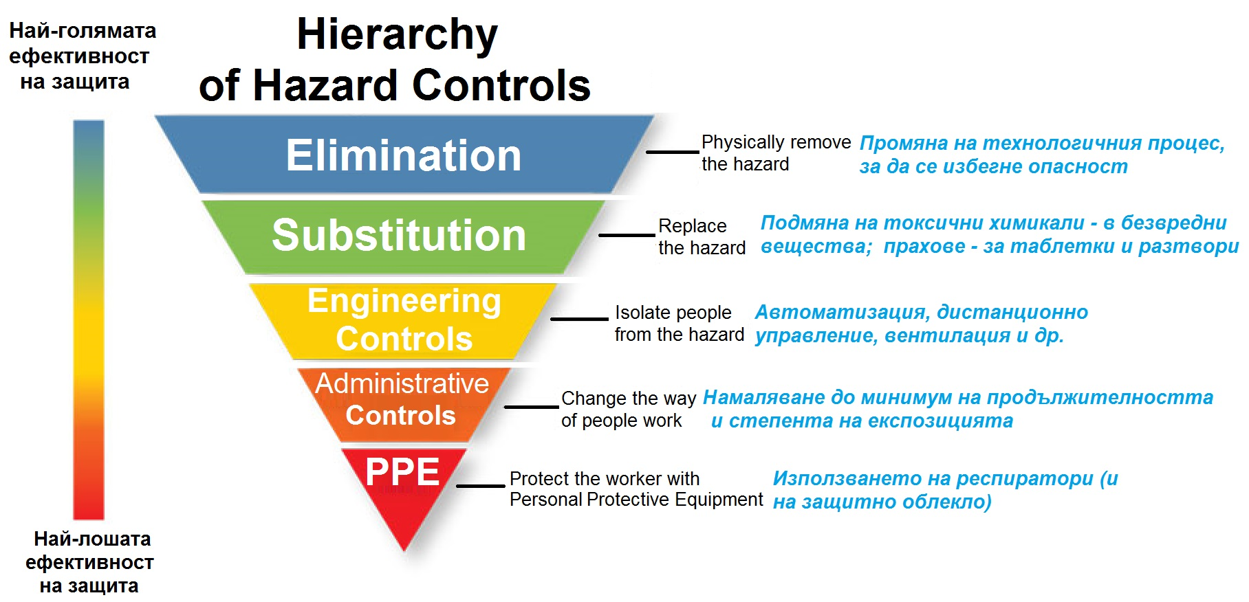 Диаграмма предпочтительности (по эффективности) методов защиты рабочих от вредных производственных факторов (согласно NIOSH)